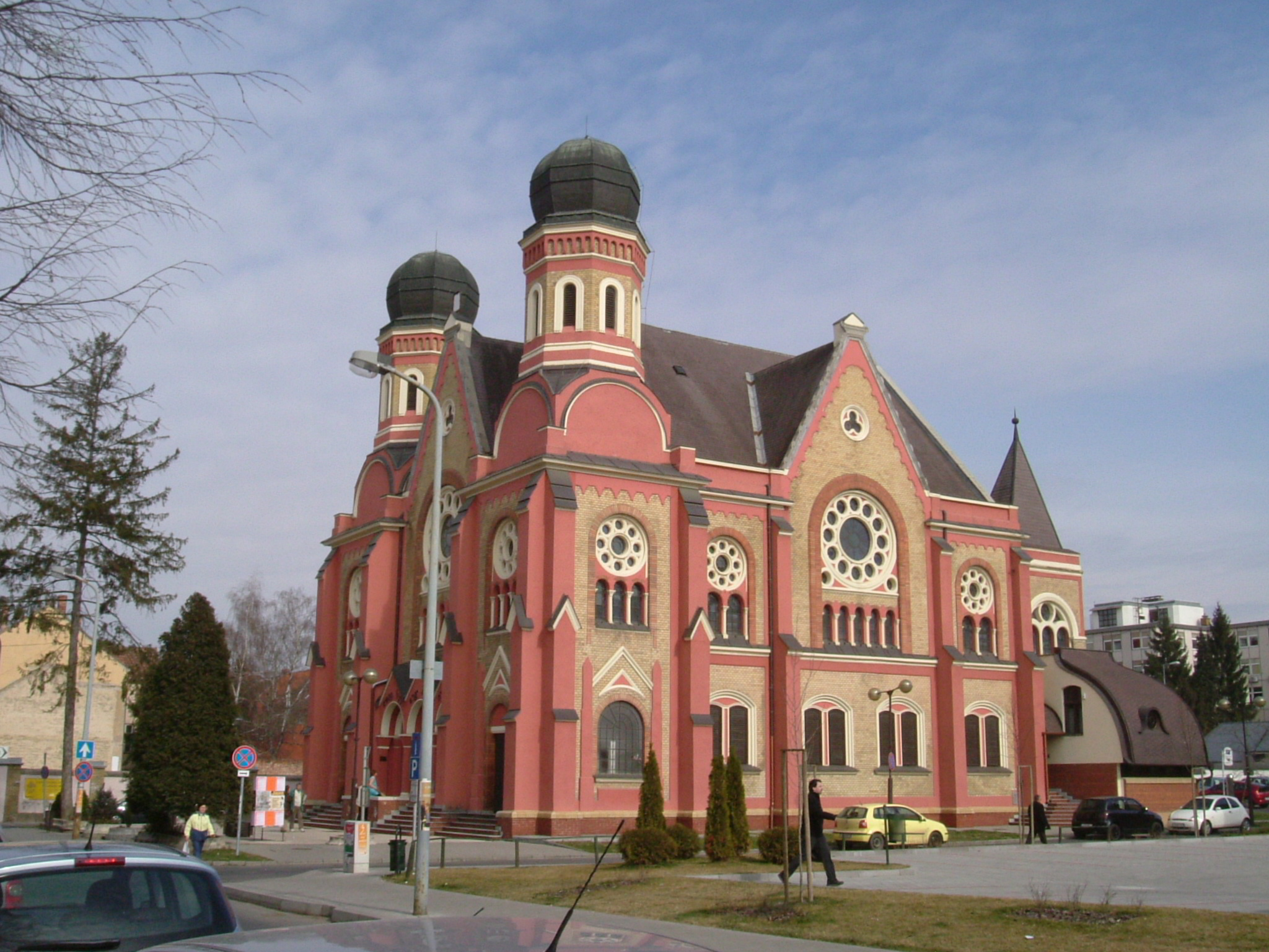 Zalaegerszeg - Hungary. Former Synagogue